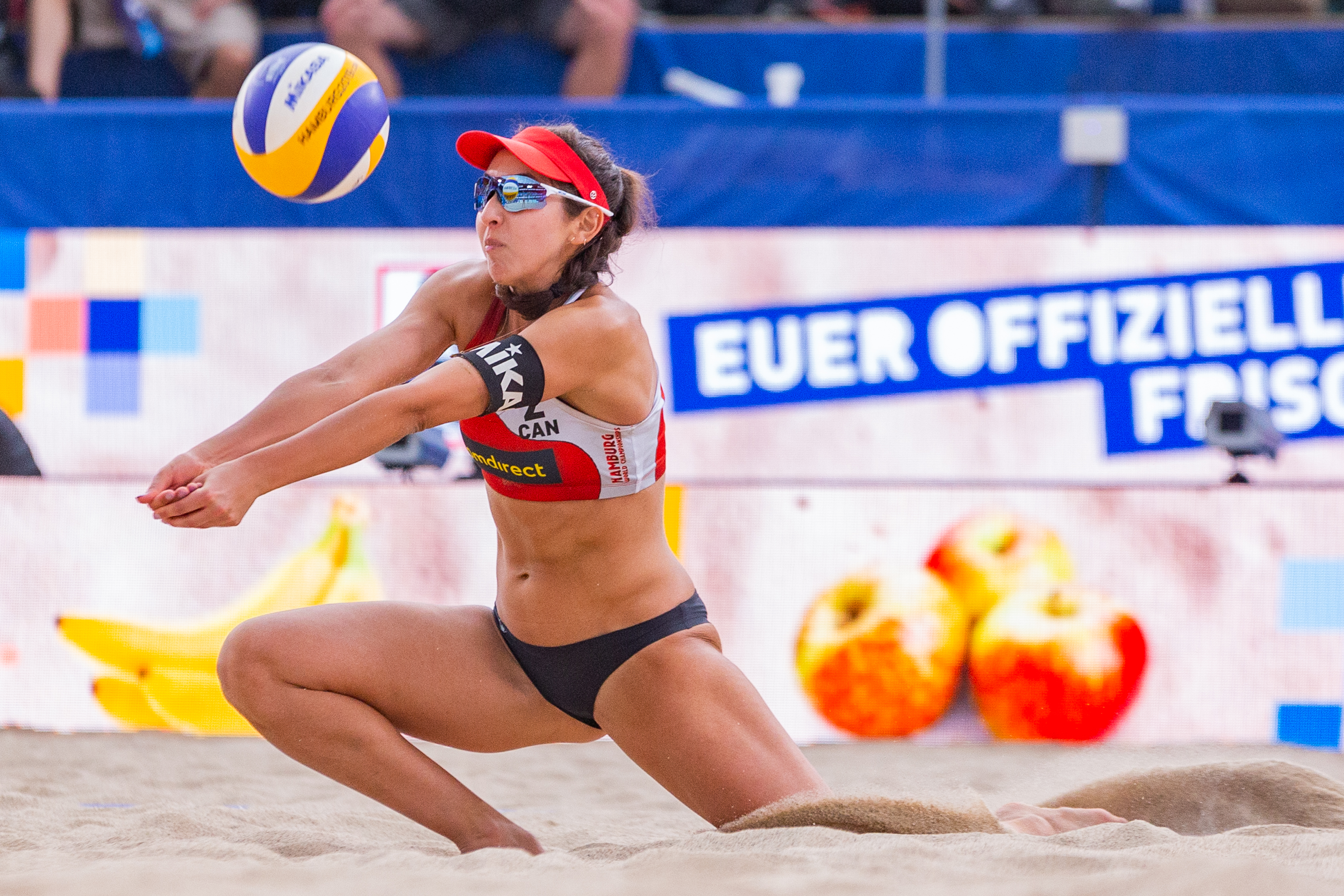 BeachVolleyball Weltmeisterschaft Hamburg 2019; Melissa Humana-Paredes (CAN, Kanada) bei der Ballannahme